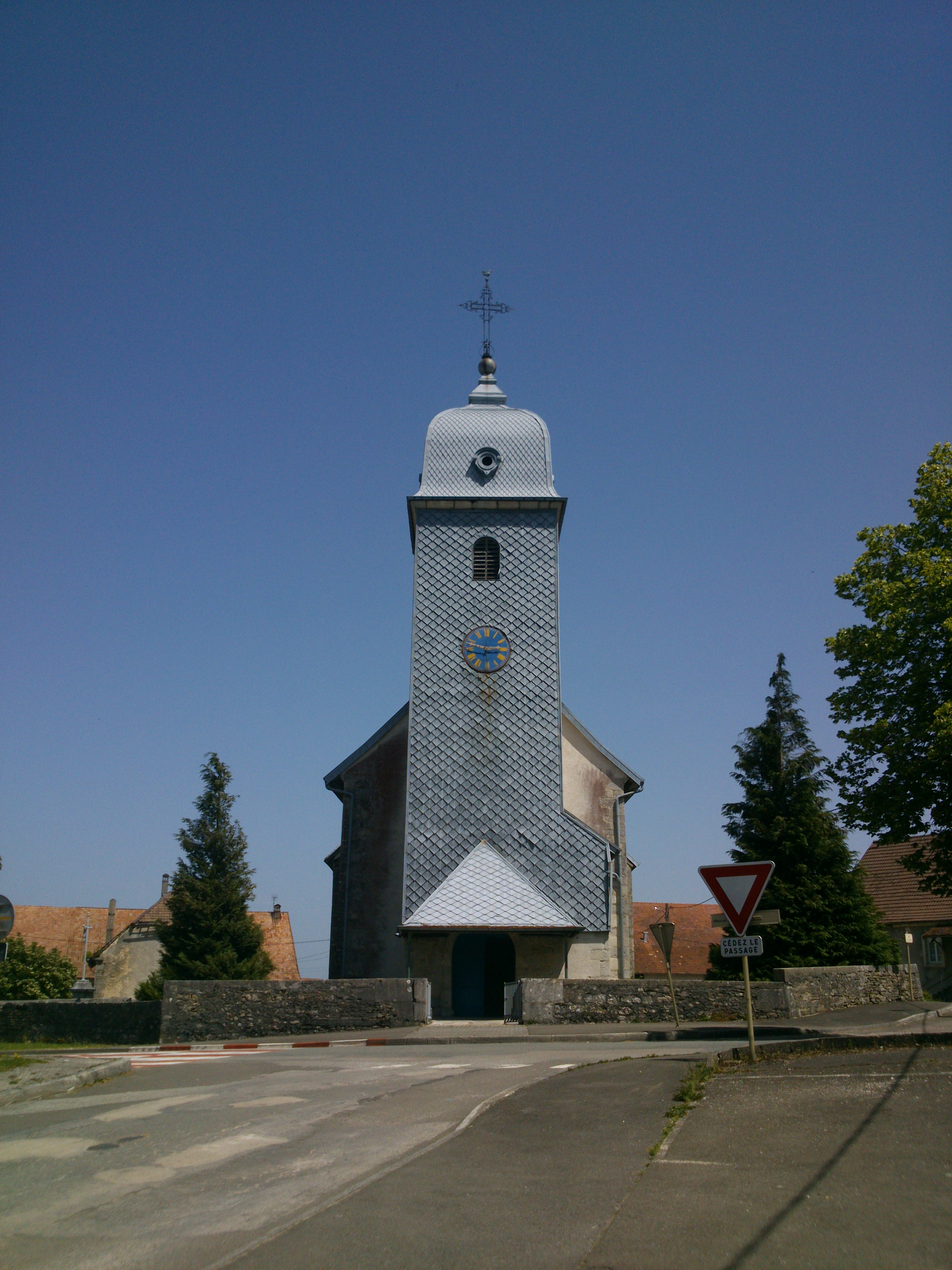 Eglise de Belleherbe, Doubs, France